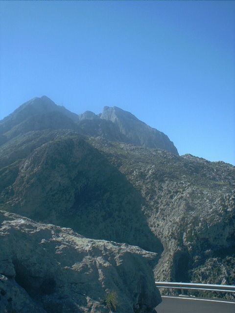 Puig Major